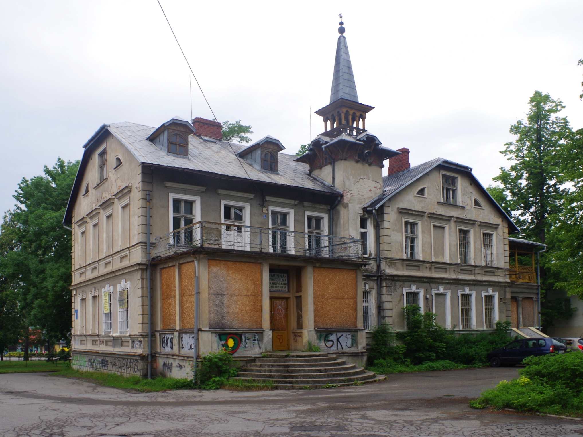 Pałac Dietla w Kluczach